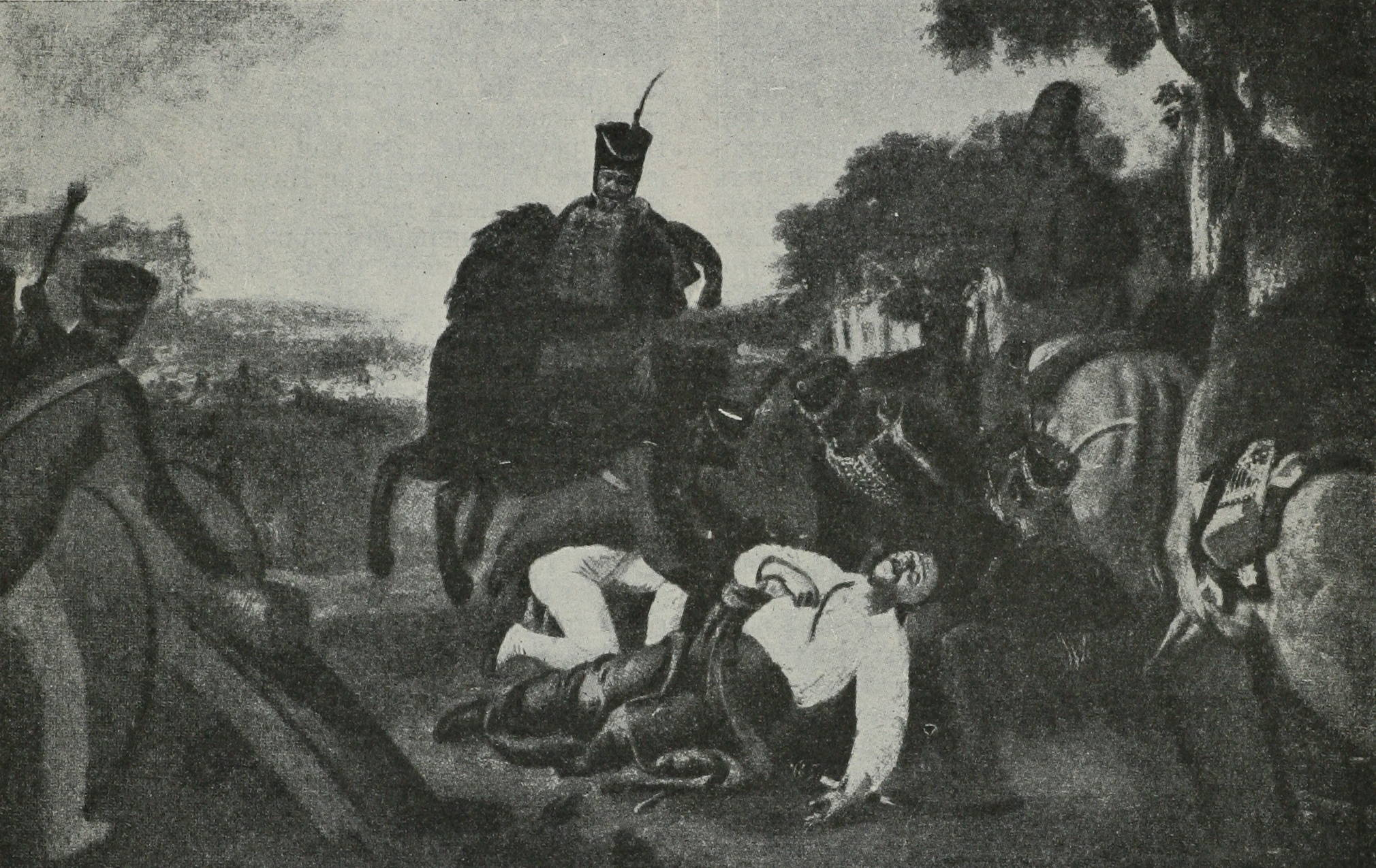 “Смерть Я.П. Кульнева” (погиб в Клястицком бою 19 (31) июля 1812 года). Картина работы художник Орловского, 1812 год. Эта картинка была использована для иллюстрирования статьи «Кульневы» опубликованной в четырнадцатом томе «Военной энциклопедии», который был издан книгоиздательским товариществом И. Д. Сытина в 1914 году в столице Российской империи городе Санкт-Петербурге. Более подробное описание к этому рисунку можно прочесть в указанной выше статье на сайте Русской Викитеки.